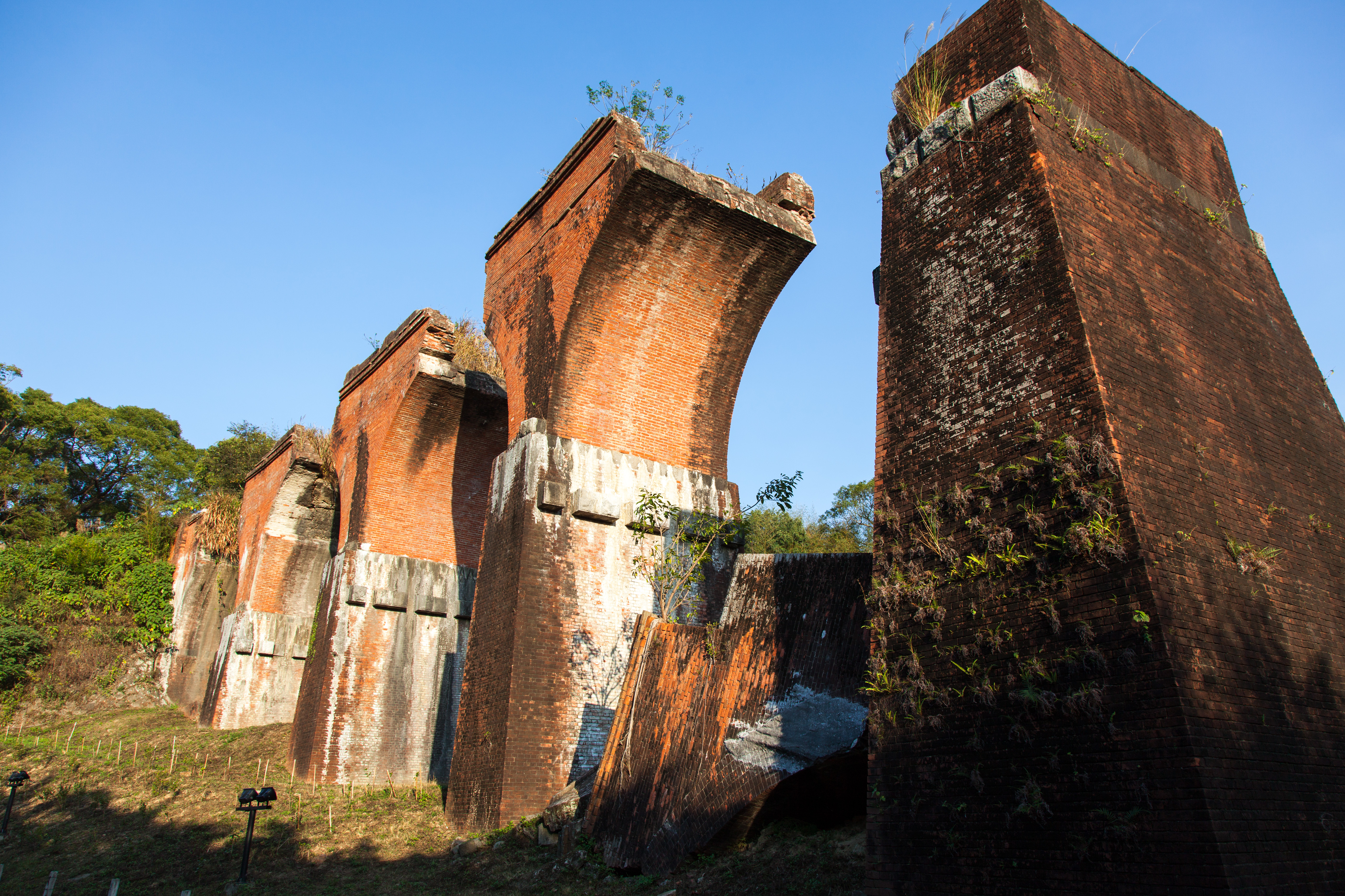 苗栗之魚藤坪斷橋